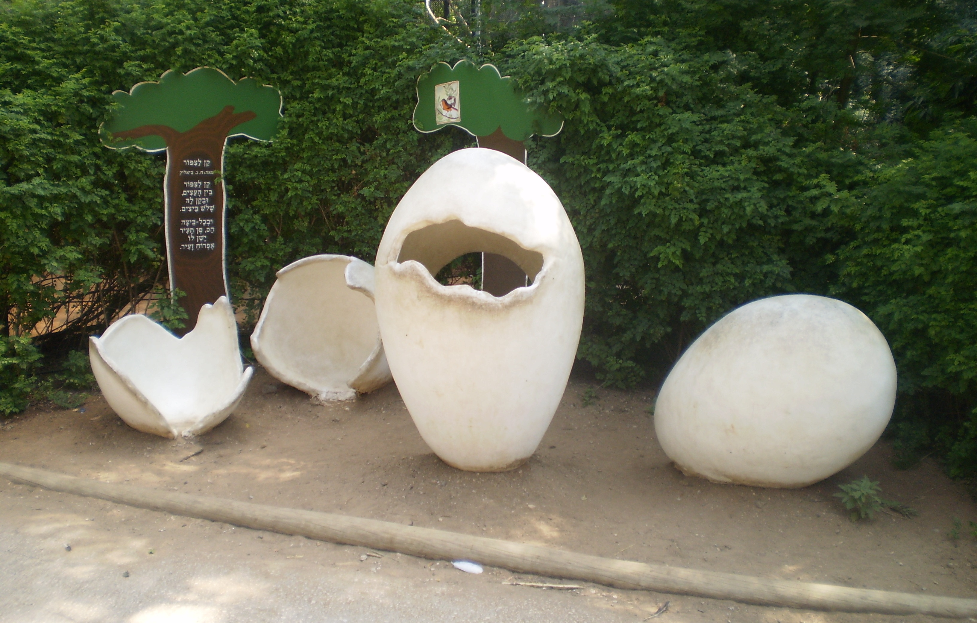 "קן ציפור" בספארי ברמת גן